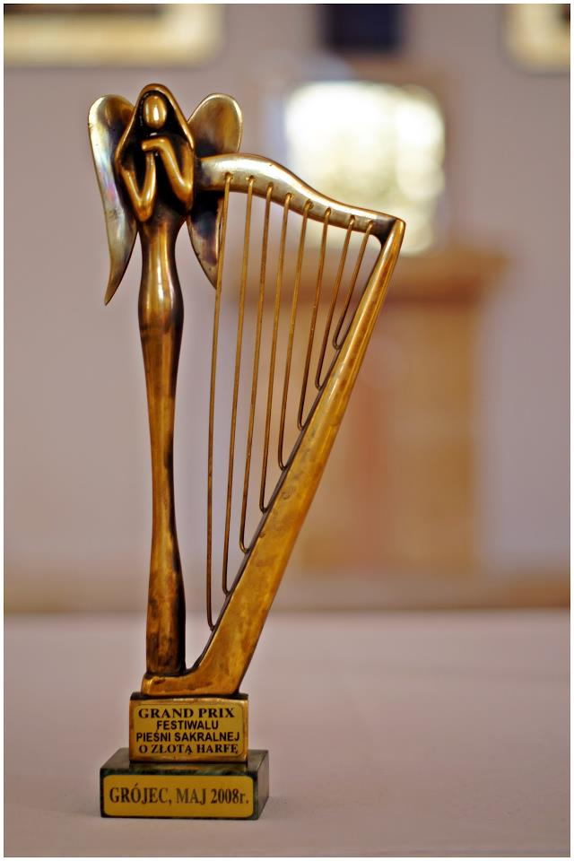 Nagroda Grand Prix festiwalu - "Złota Harfa"